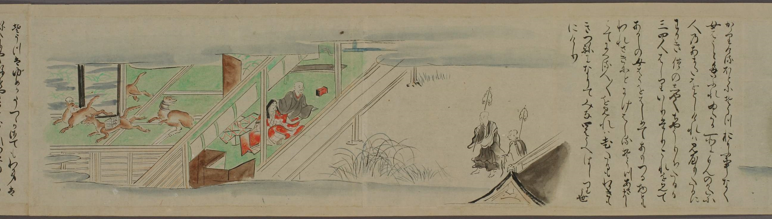 Kitsune soshi emaki, 15.0×572.1cm, copie de 1849 (original datant de fin XVe/début XVIe attribué à Tosa Mitsunobu. Bibliothèque de l'université Waseda. N° 12 01586.